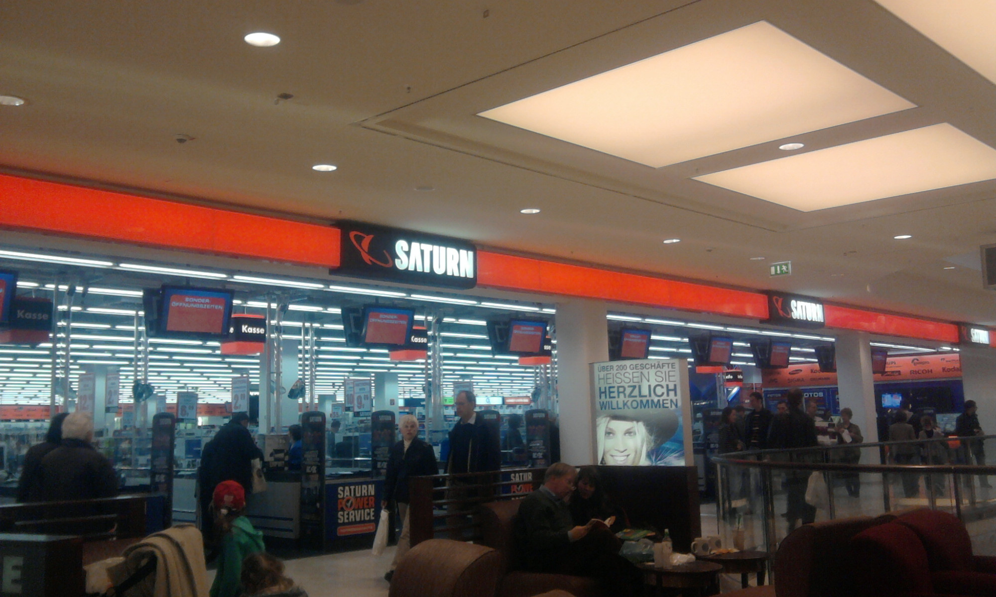 Saturn im Einkaufscenter Limbecker Platz